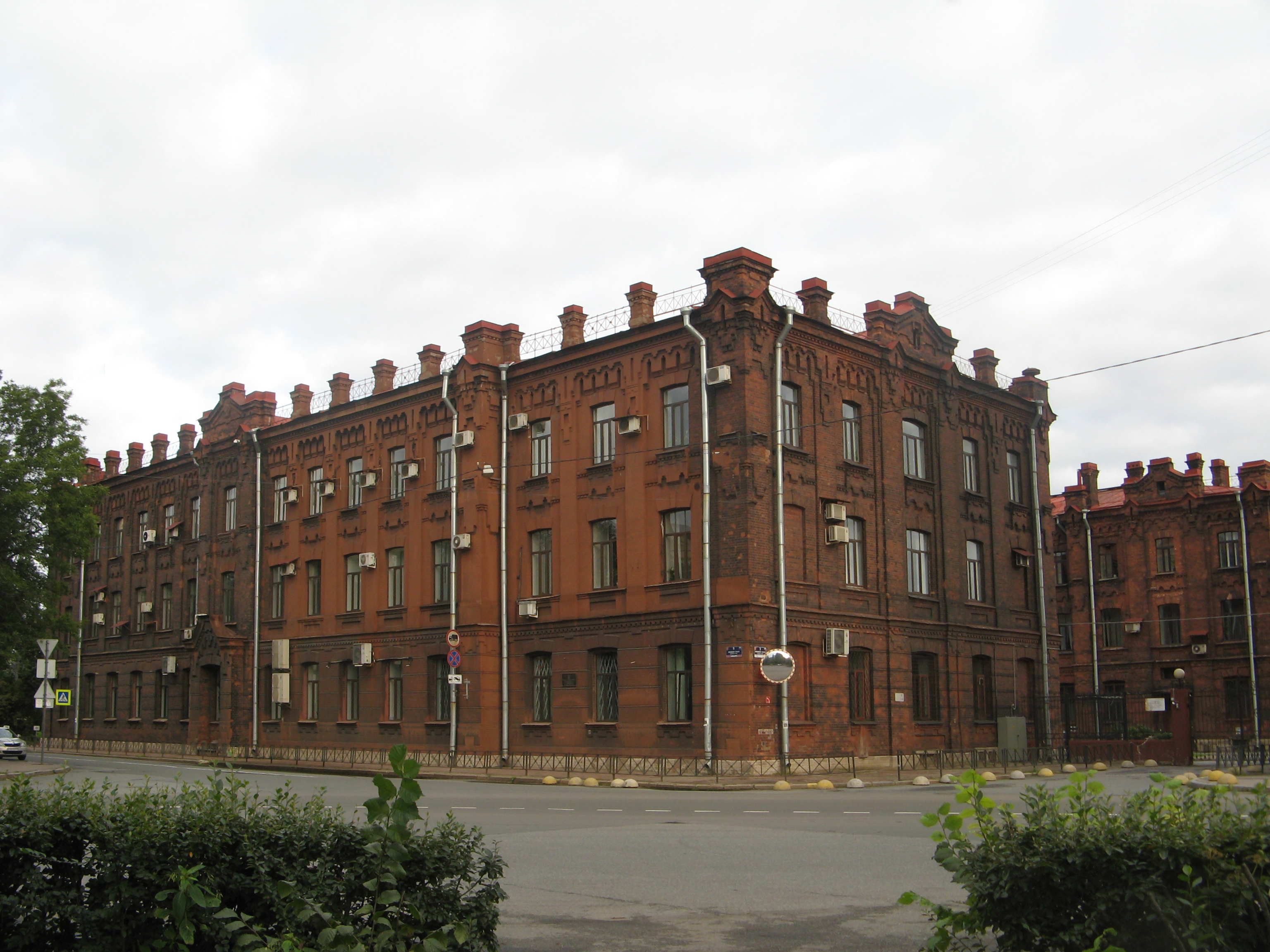 Здание портовой таможни: Межевой канал, 5, Кировский район, Санкт-Петербург